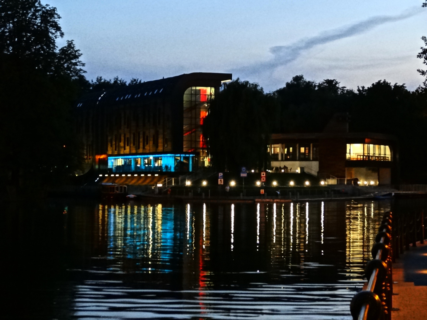 Przystań Bydgoszcz na Wyspie Młyńskiej